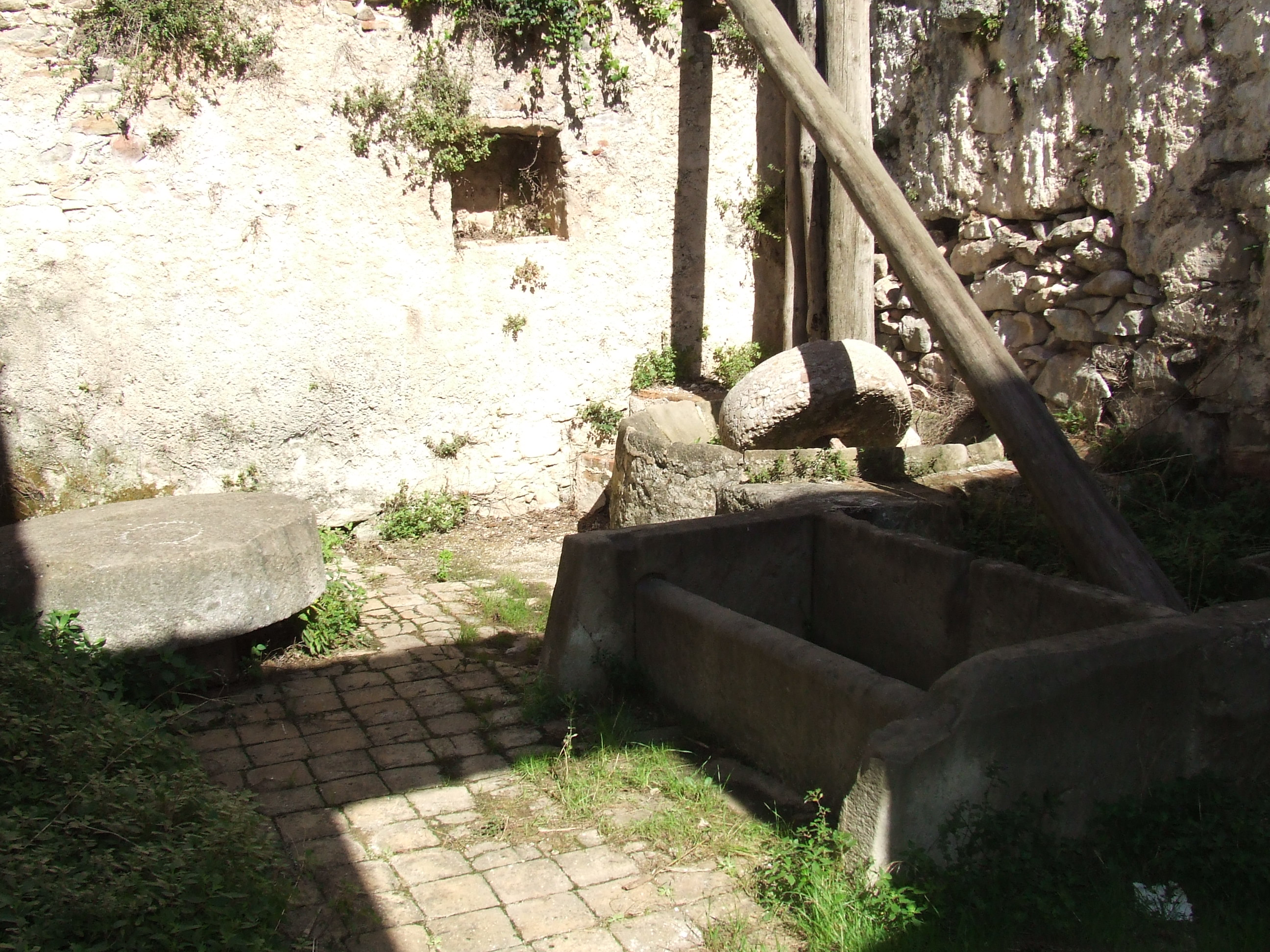 Interior del Molí de la Madella (Riells del Fai, Bigues i Riells, Vallès Oriental)